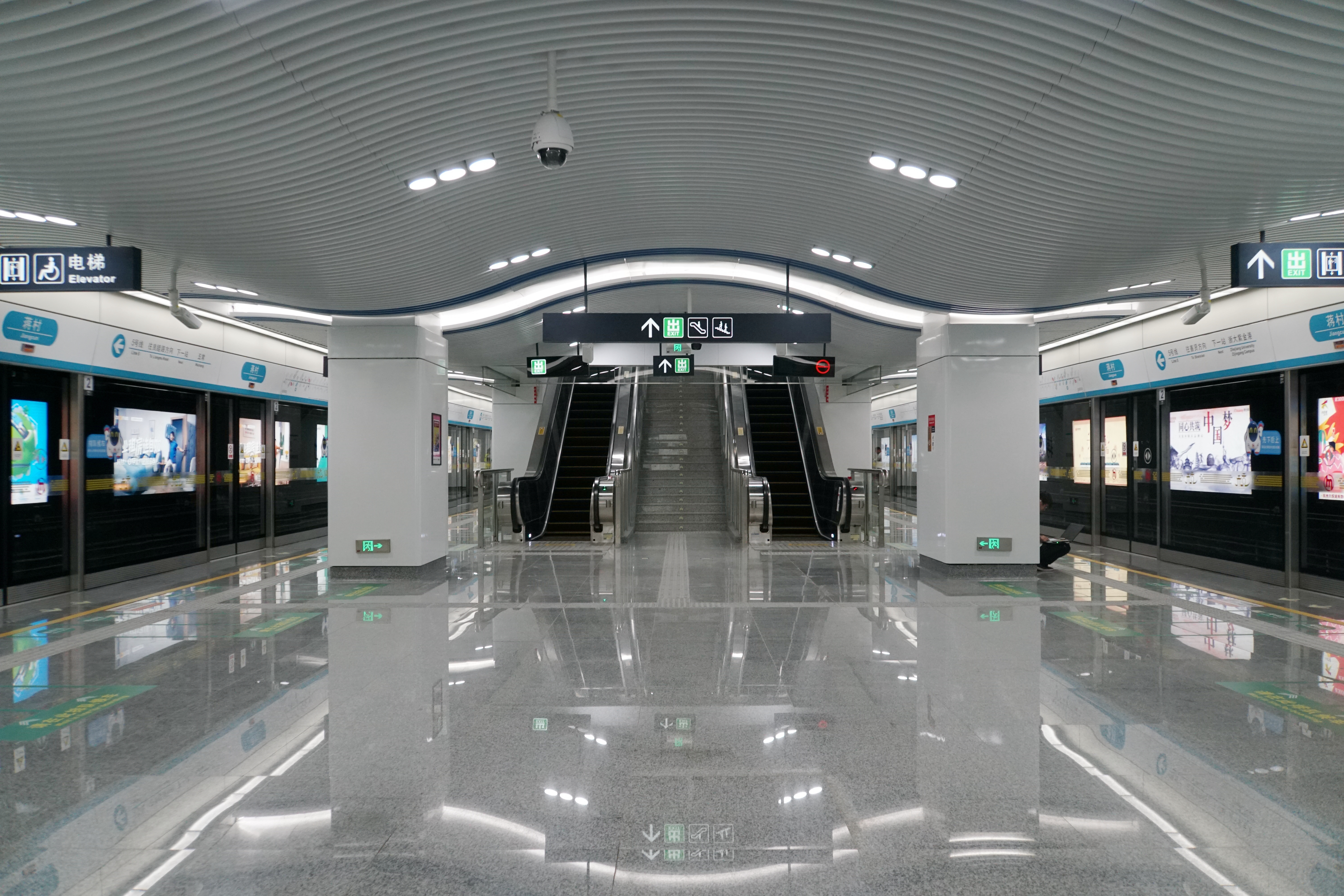 蒋村站站台